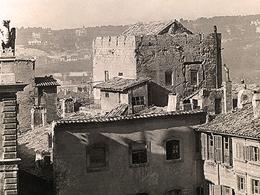 Livrée du cardinal de Mirault dominant le quartier de la Balance